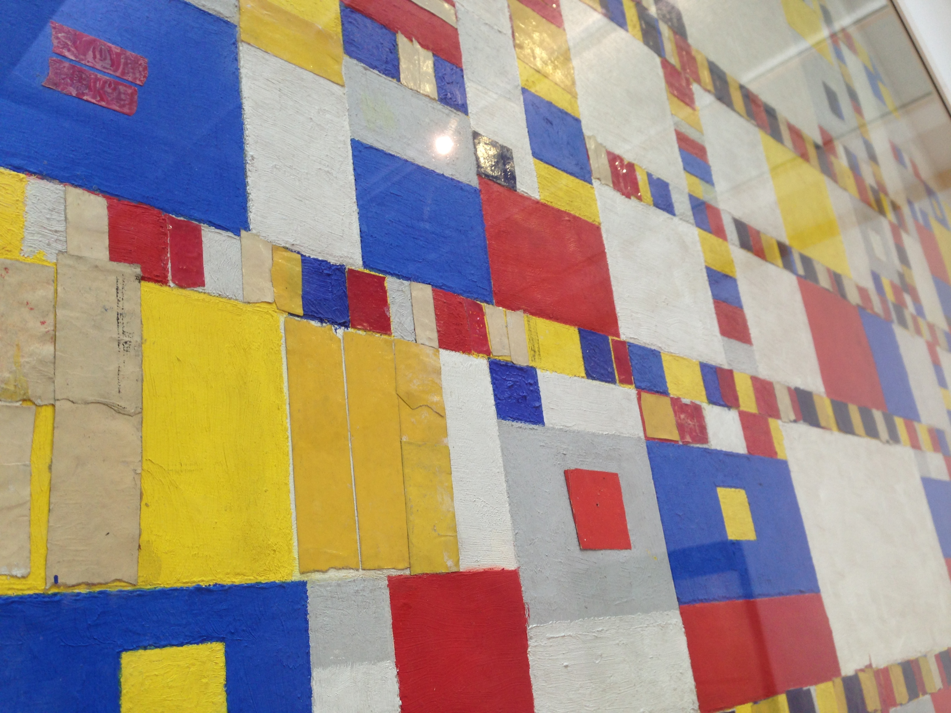 Victory Boogie Woogie, painting of Piet Mondriaan